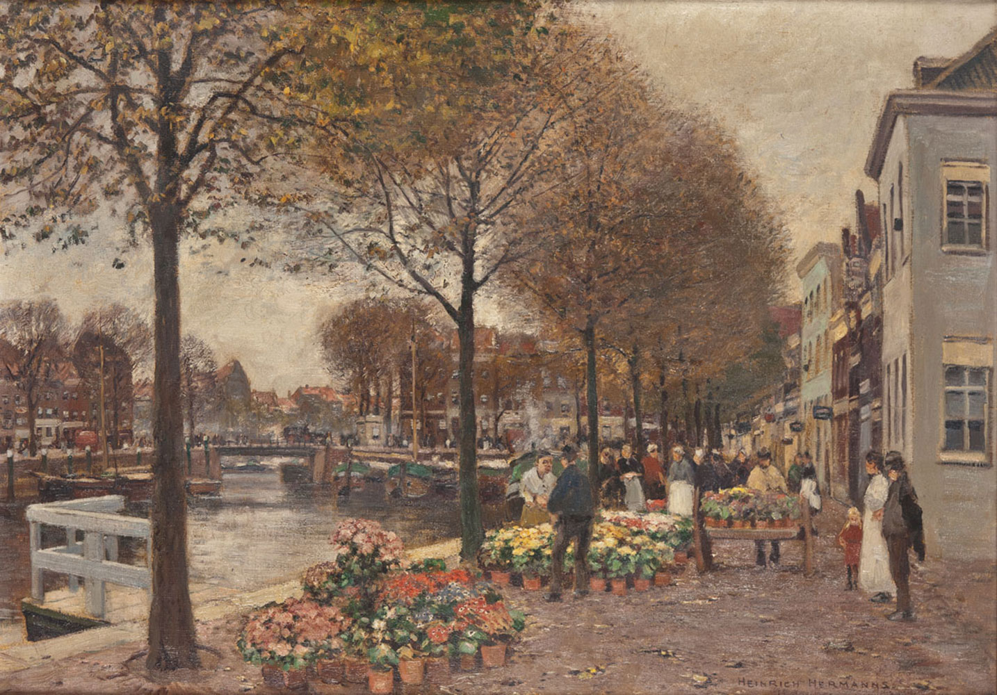 Blumenmarkt an der Grachtenpromenade. Öl auf Leinwand 61 cm x 84 cm